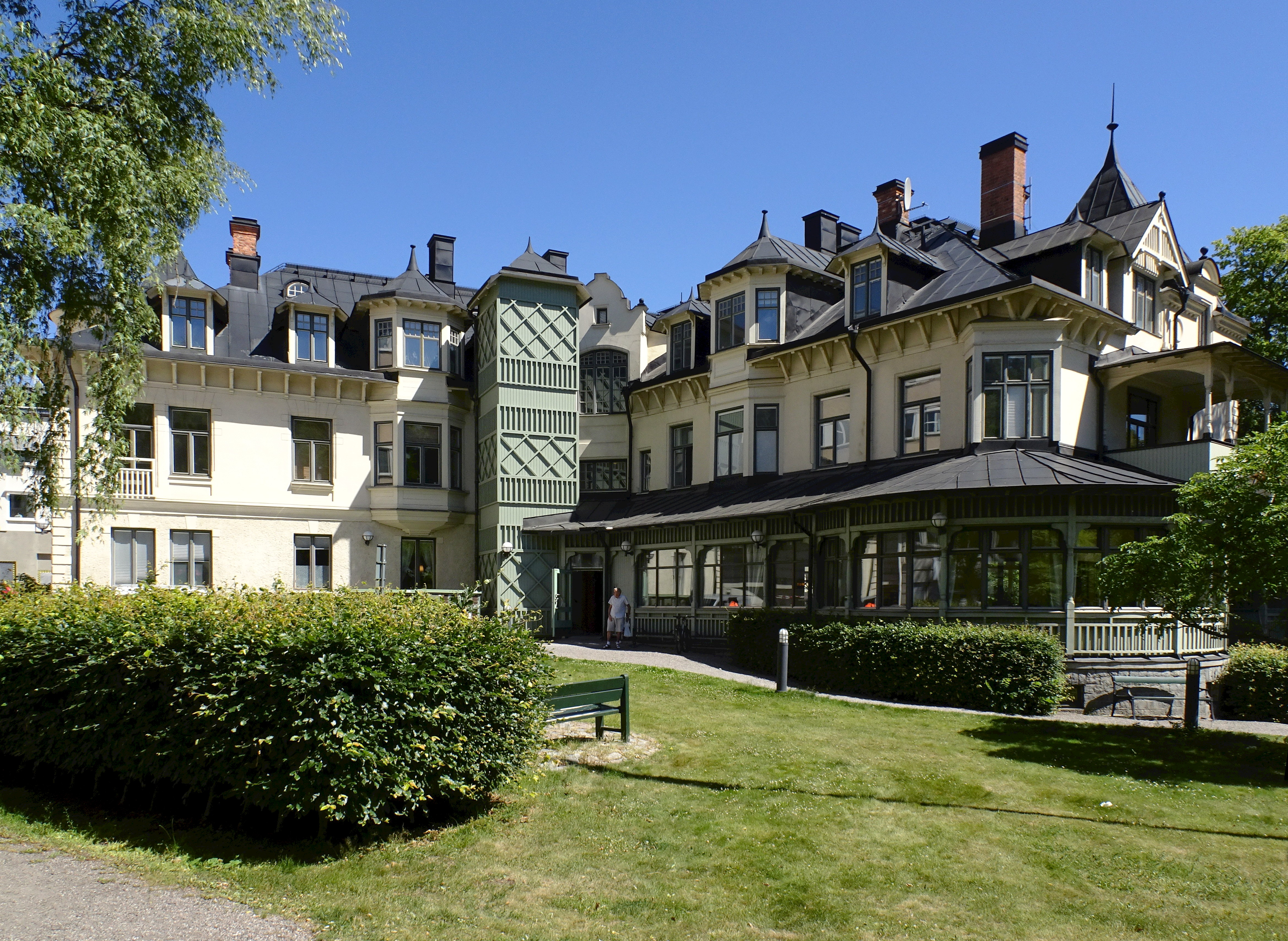 Badhotellet, Södertälje, arkitekt Edward Ohlsson (1899)